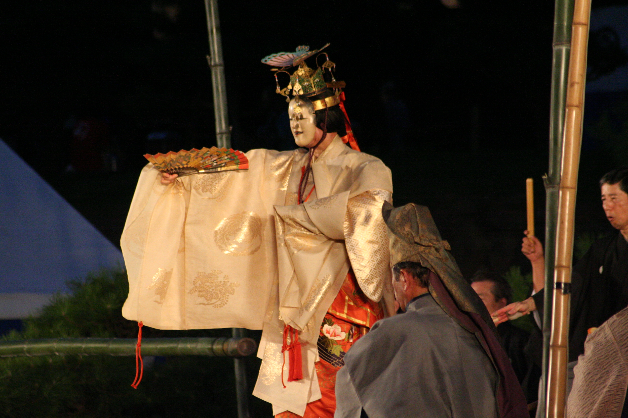 2009年7月31日に姫路城三の丸広場で行なわれた姫路薪能の様子。